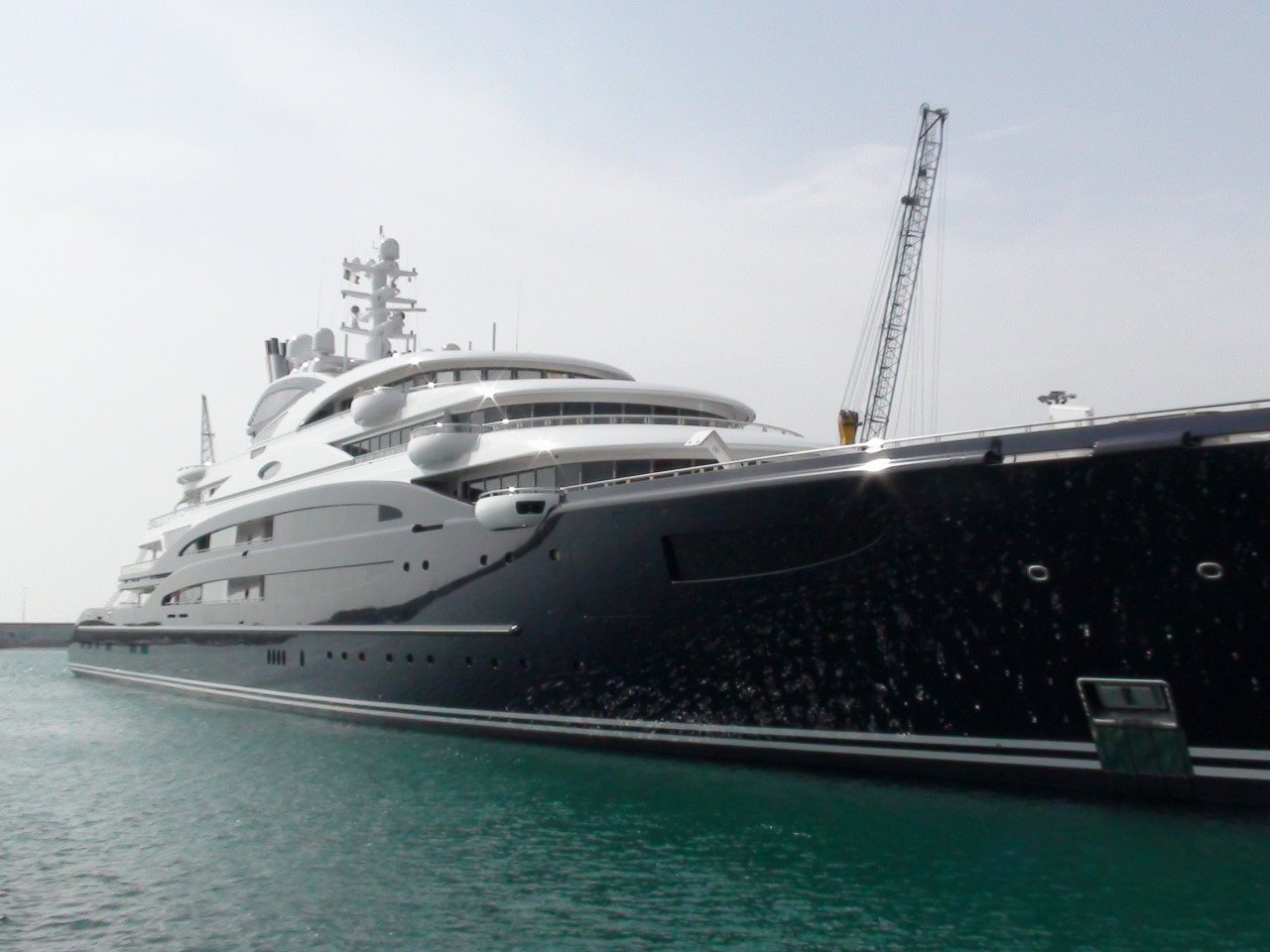 Aufnahme der "Serene" im Hafen von Imperia/IT